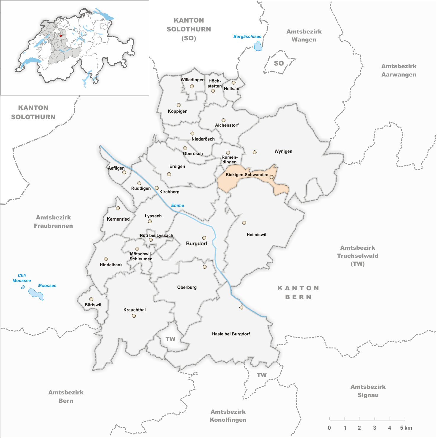 Municipality Bickigen-Schwanden